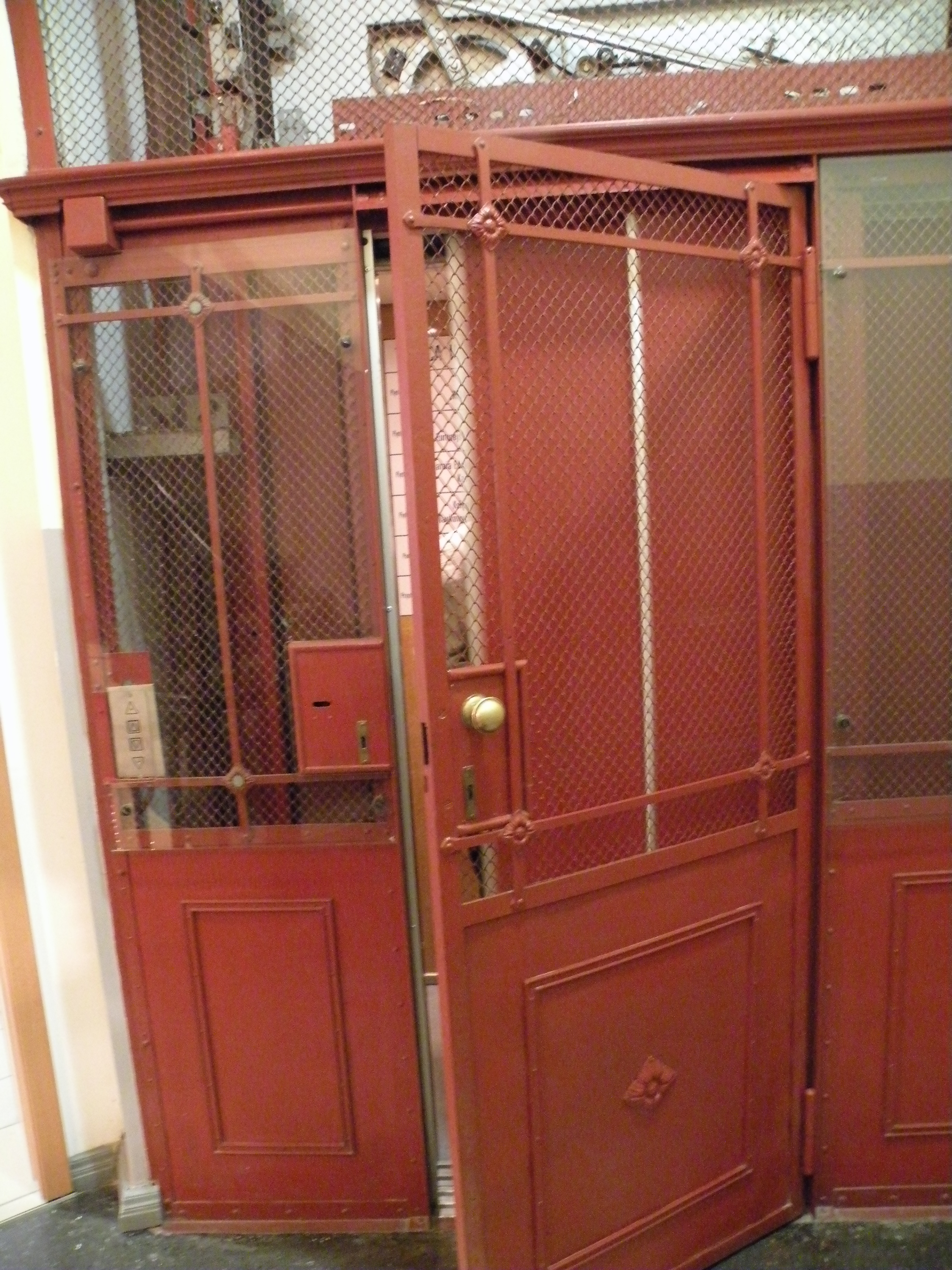 najstarsza windaw w Olsztynie